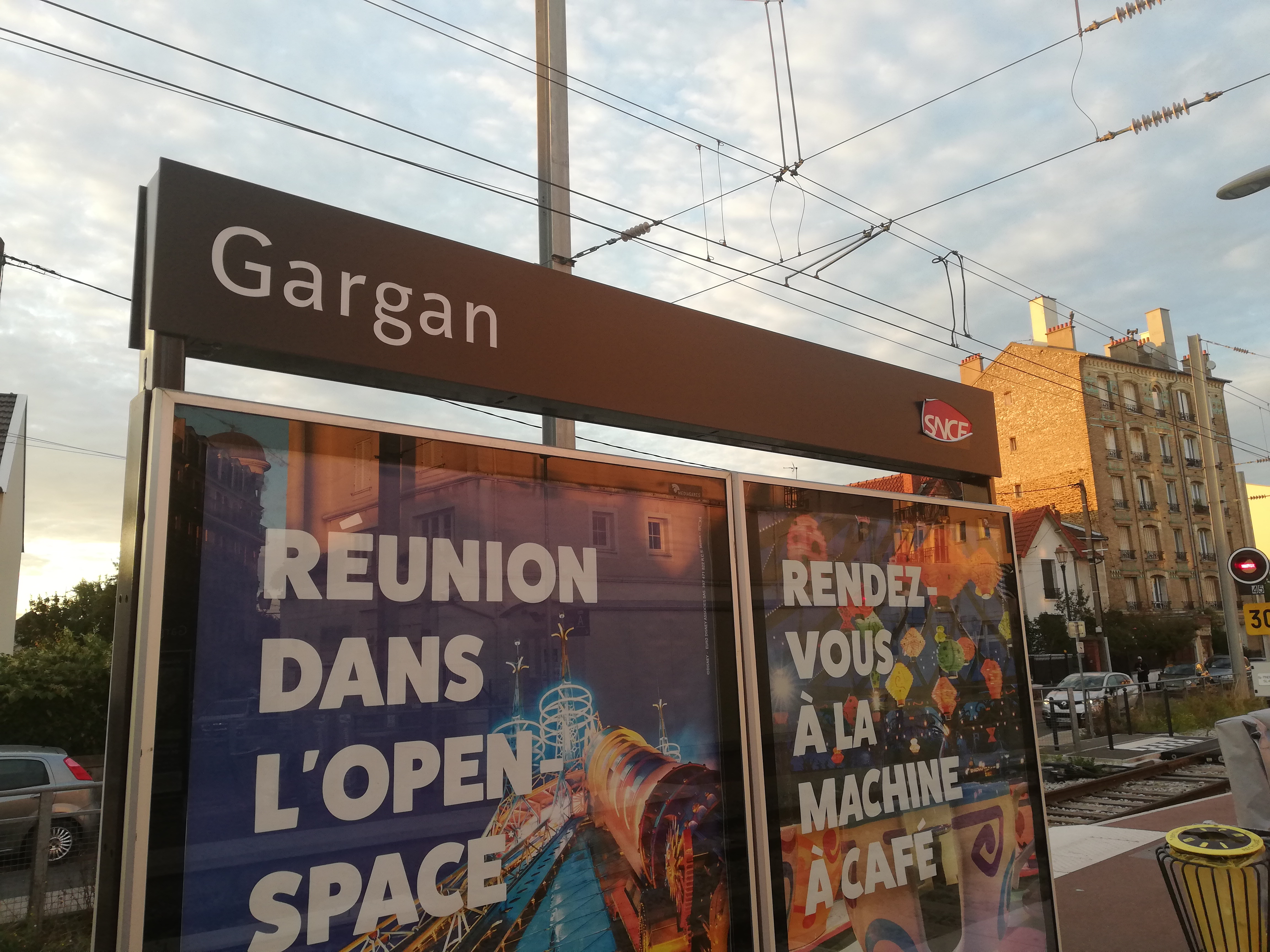 Plaque signalétique de la gare de Gargan.